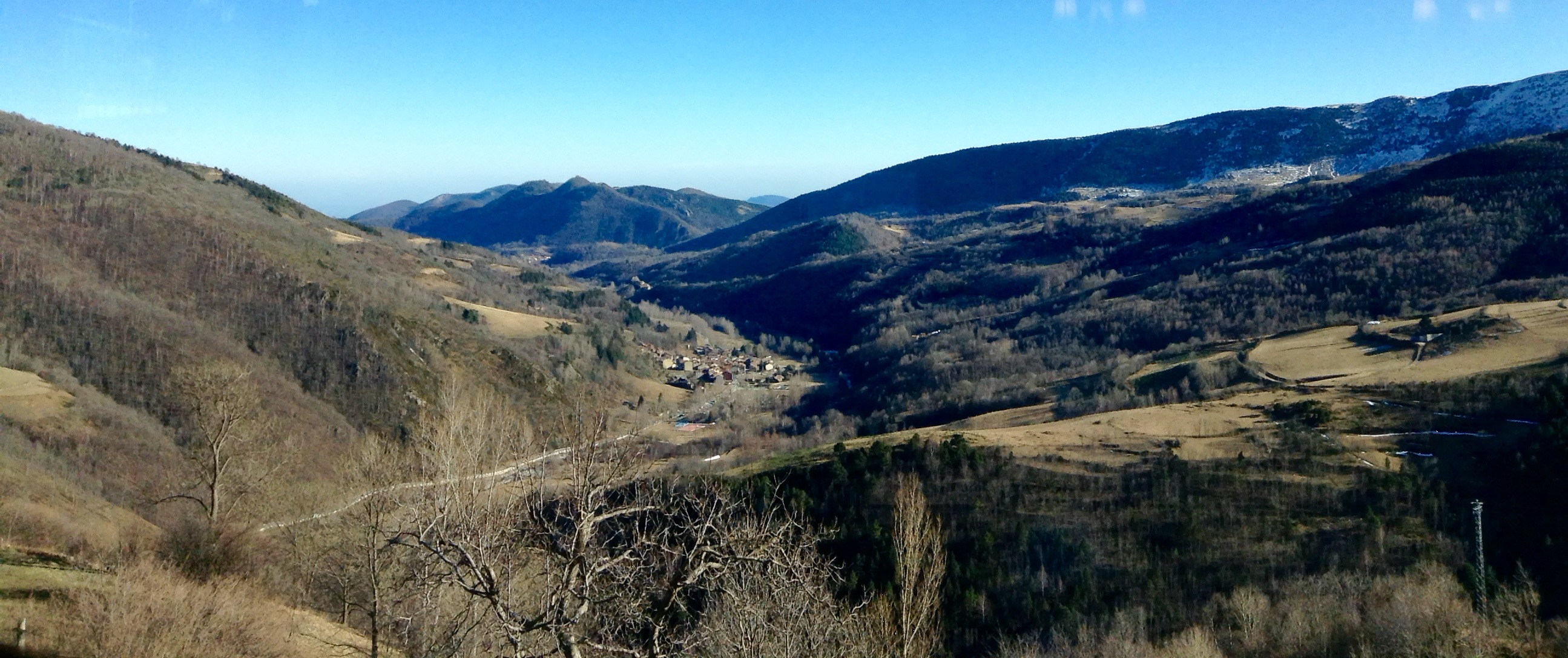 Vilallonga de Ter